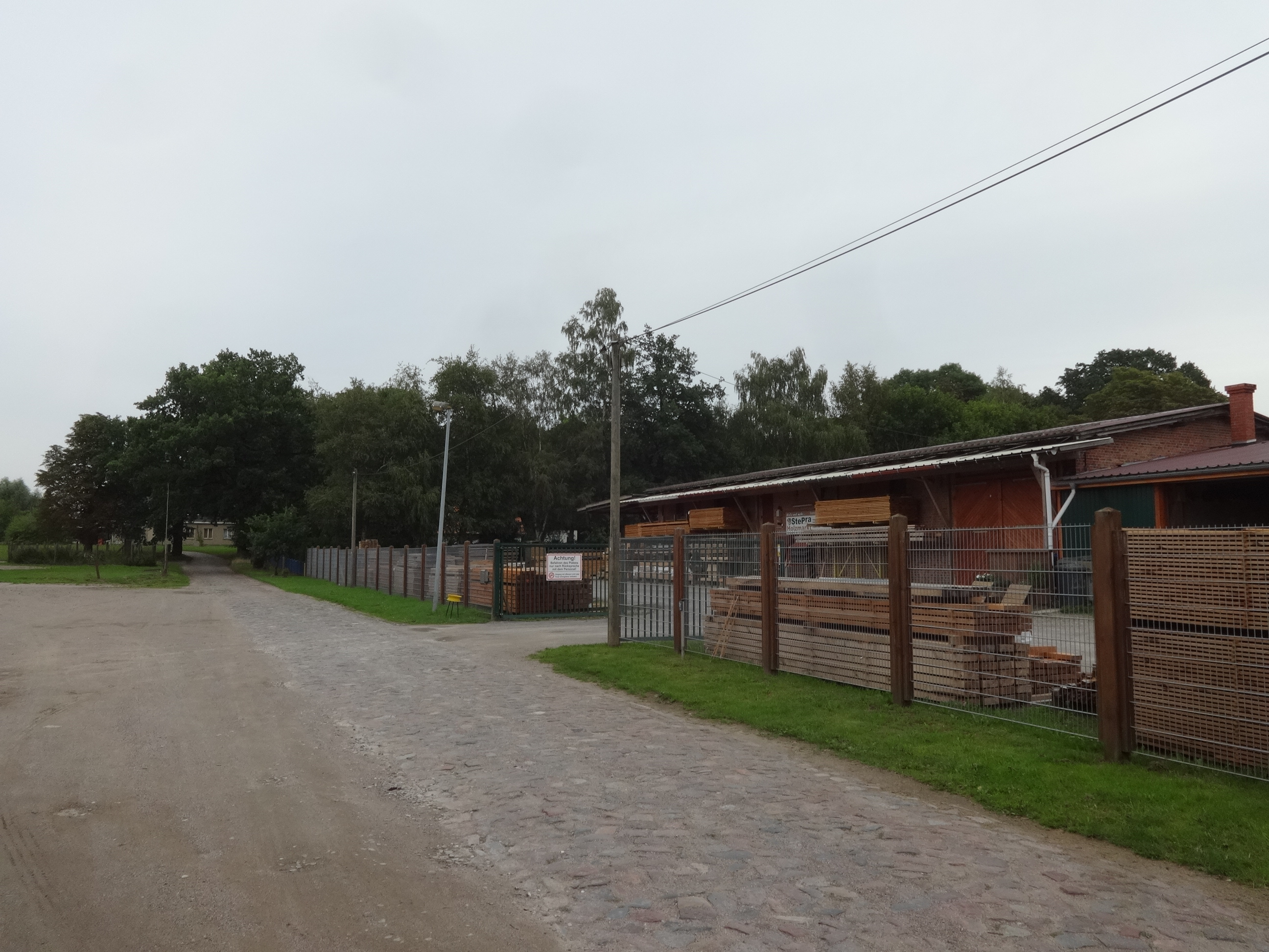 Kessin, ein Ortsteil von Groß Kiesow in Mecklenburg-Vorpommern